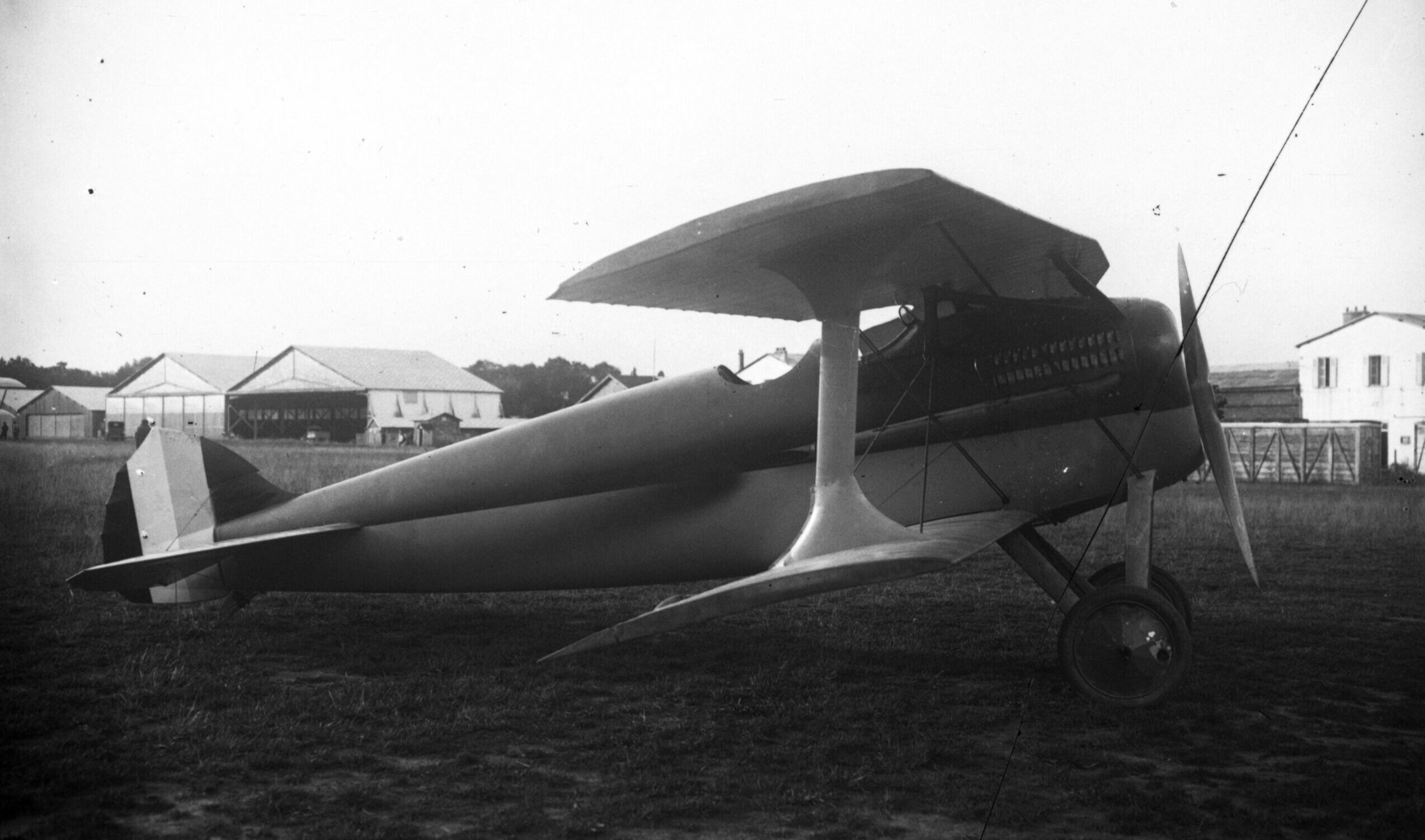 Avion Spad-Herbermon en 1920